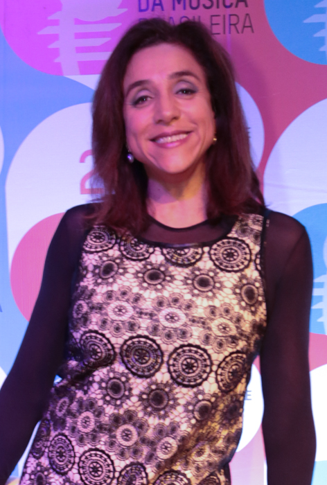 Marisa Orth durante o 25º Prêmio da Música Brasileira no Theatro Municipal. Foto: Reginaldo Teixeira (14/05/14)